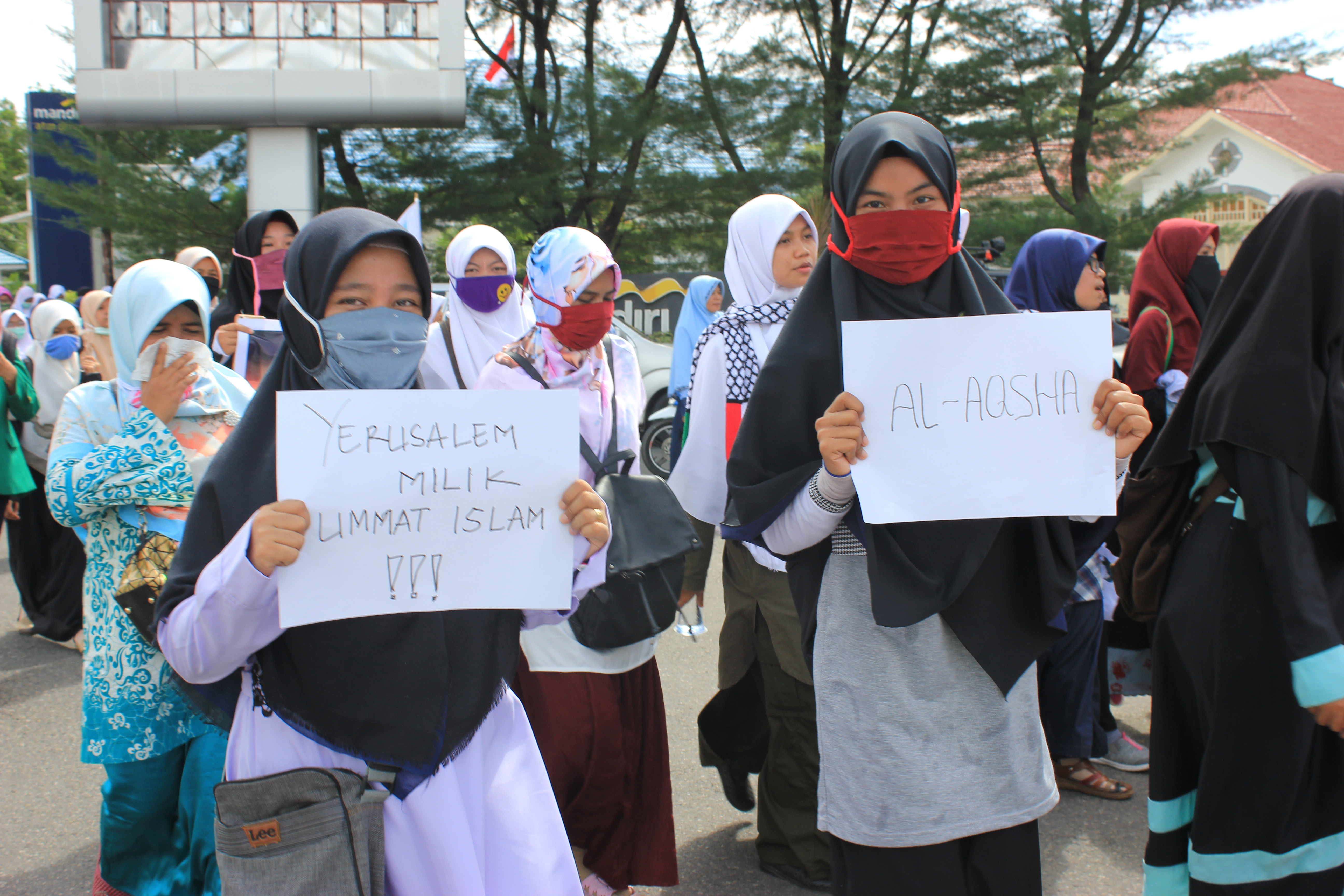 Ormas Islam se-Sumatera Barat menggelar aksi bela Palestina di depan Masjid Agung Nurul Iman, Jalan M. Yamin, Jalan Permindo, Jalan Sudirman dan Kantor Gubenur Sumbar. Aksi tersebut sebagai bentuk kecaman atas pernyataan Presiden Amerika, Donald Trump yang menyatakan Yerusalem sebagai ibu kota Israel. Aksi ini digelar pada Jum'at (15/12/2017) ba’da sholat jumat.